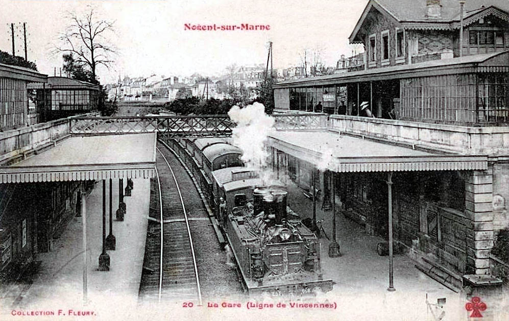 La gare de Nogent-sur-Marne (ligne de Vincennes), Val-de-Marne, France.